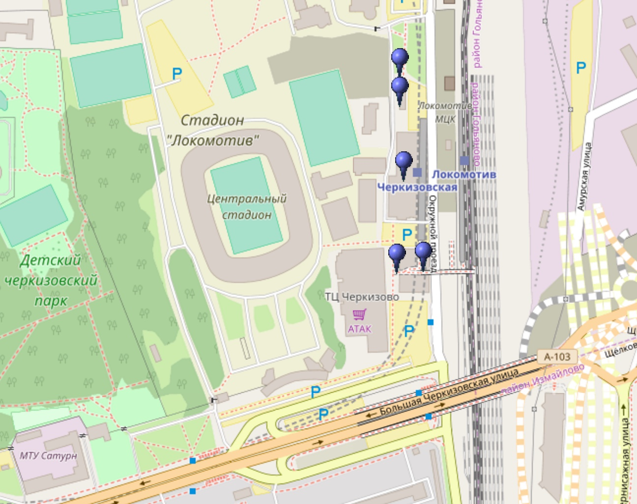 Pan de situation de la station Tcherkizovskaïa (métro de Moscou) et de son bâtiment et de ses bouches.